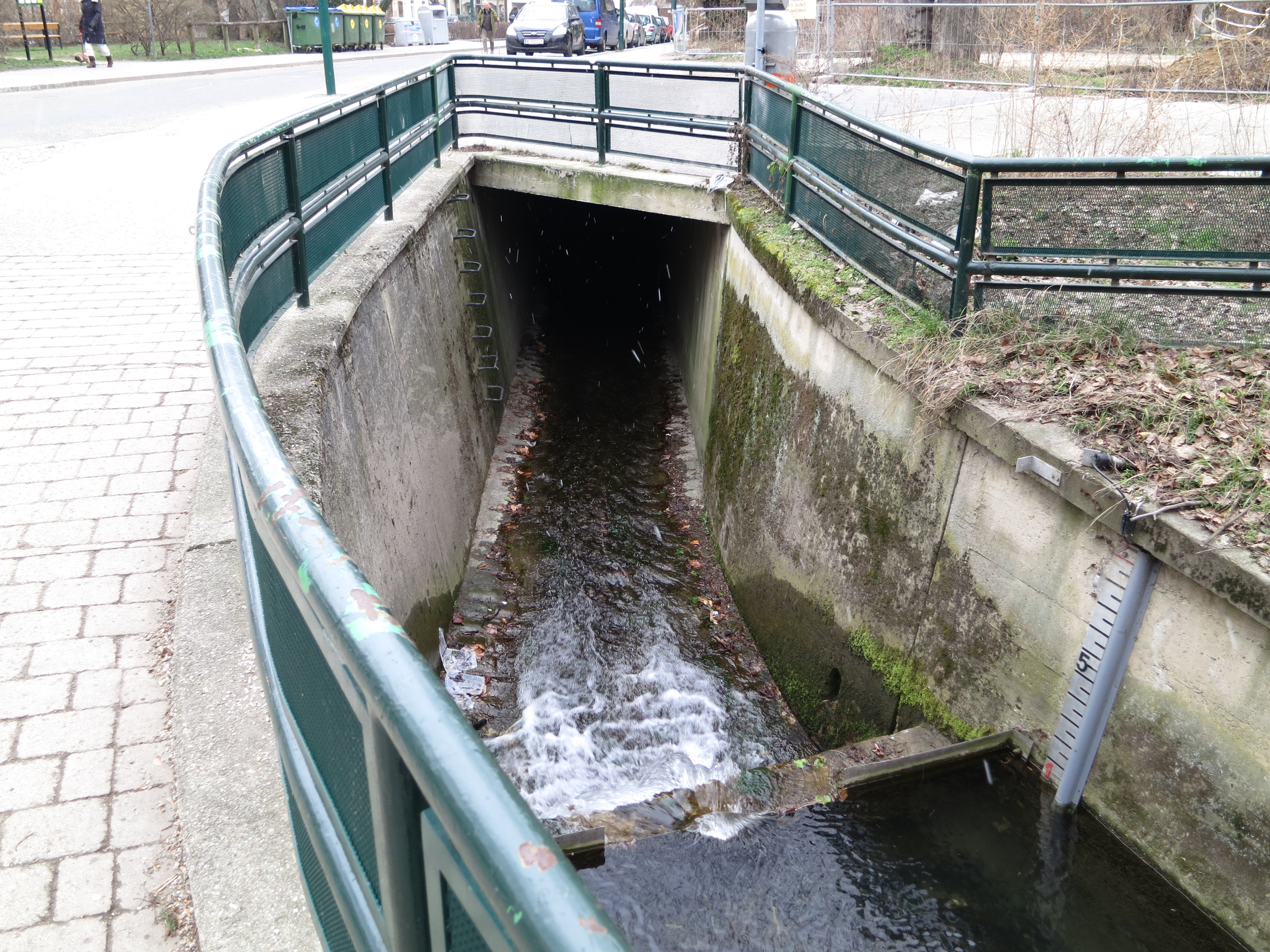 Schreiberbach in Wien-Döbling an der Zahnradbahnstraße; von hier an ist er endgültig verrohrt